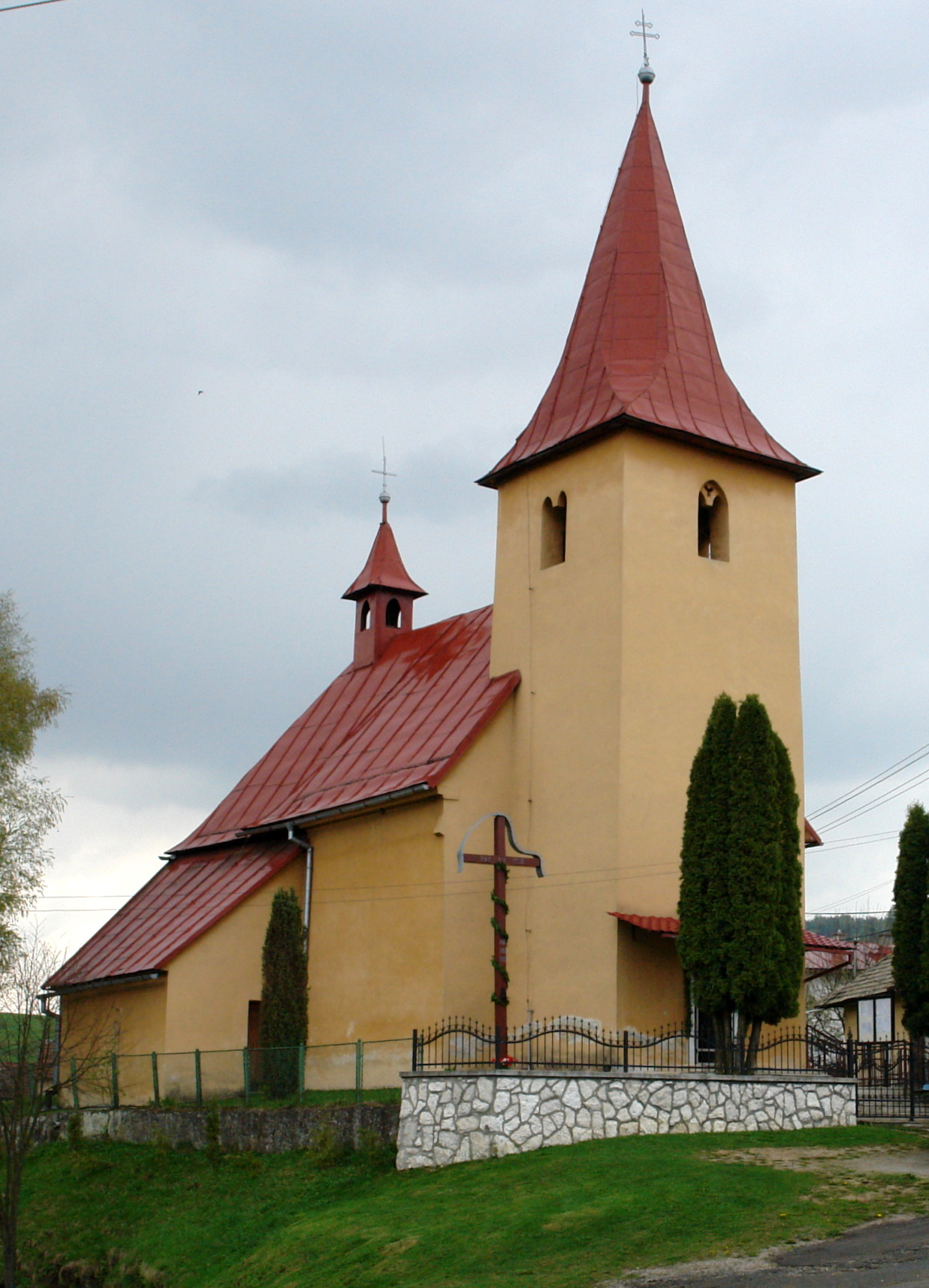 Vitfalva - Vítkovce. Szent Fülöp és Jakab apostoloknak szentelt római katolikus temploma a 13. században épült, a 18. században barokk stílusban építették át. 14. századi freskói vannak, melyek egyike a Szent László legendát ábrázolja.